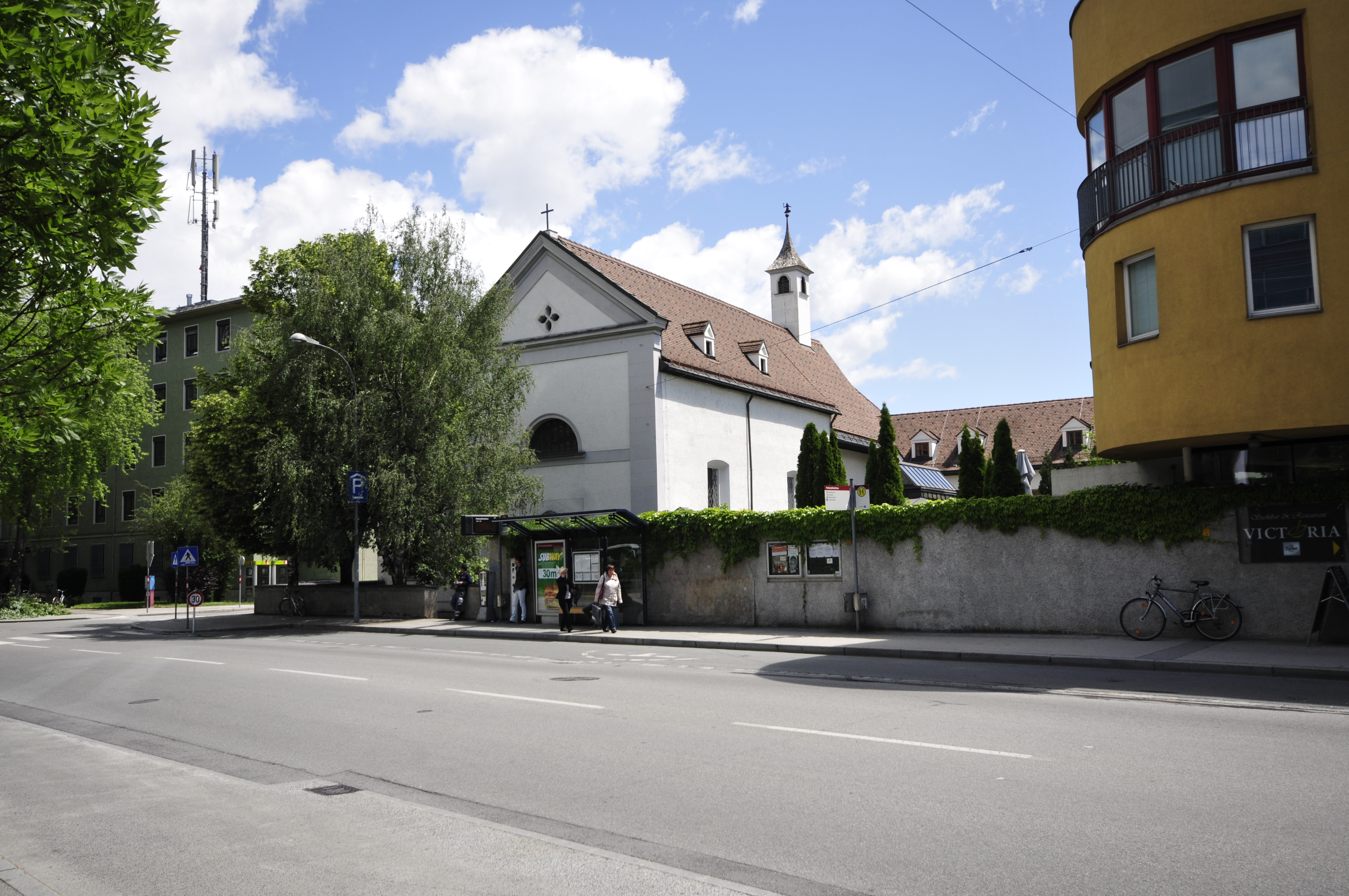 Innsbruck Im Rahmen des Fußballländerspiels Österreich gegen Rumänien bin ich einige Stunden durch Innsbruck gefahren und habe Aufnahmen gemacht, die vielleicht mal gebraucht werden könnten. --Ralf Roleček 11:20, 10 June 2012 (UTC) The making of this work was supported by Wikimedia Austria. For other files made with the support of Wikimedia Austria, please see the category Supported by Wikimedia Österreich.